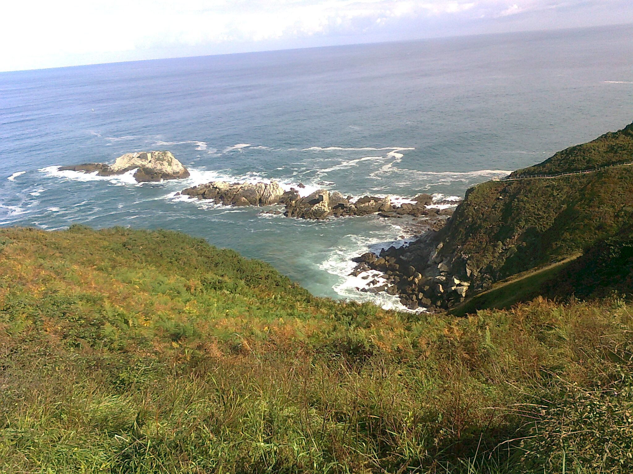 Compañia Franco-Belgaren zamalekua Zarautz eta Orio artean